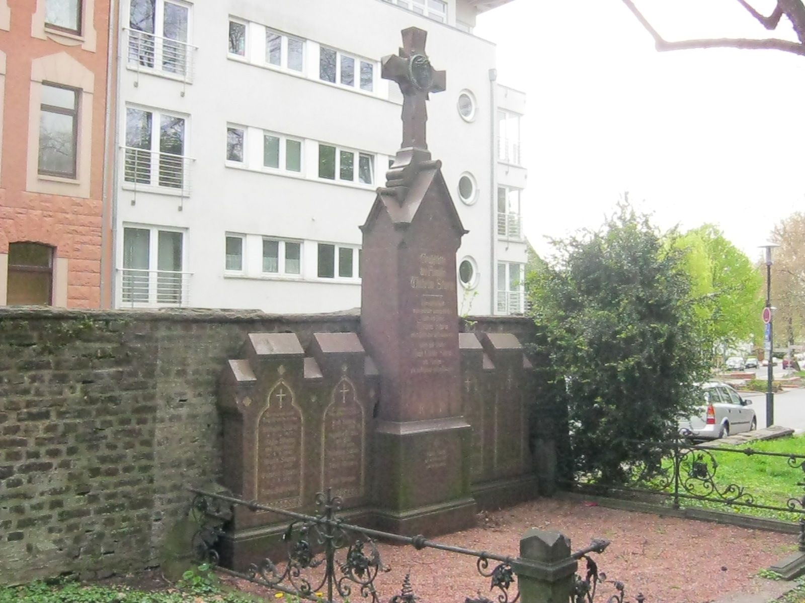 Grabstätte der Familie Sturm auf dem alten Dürener Friedhof, Kölnstraße